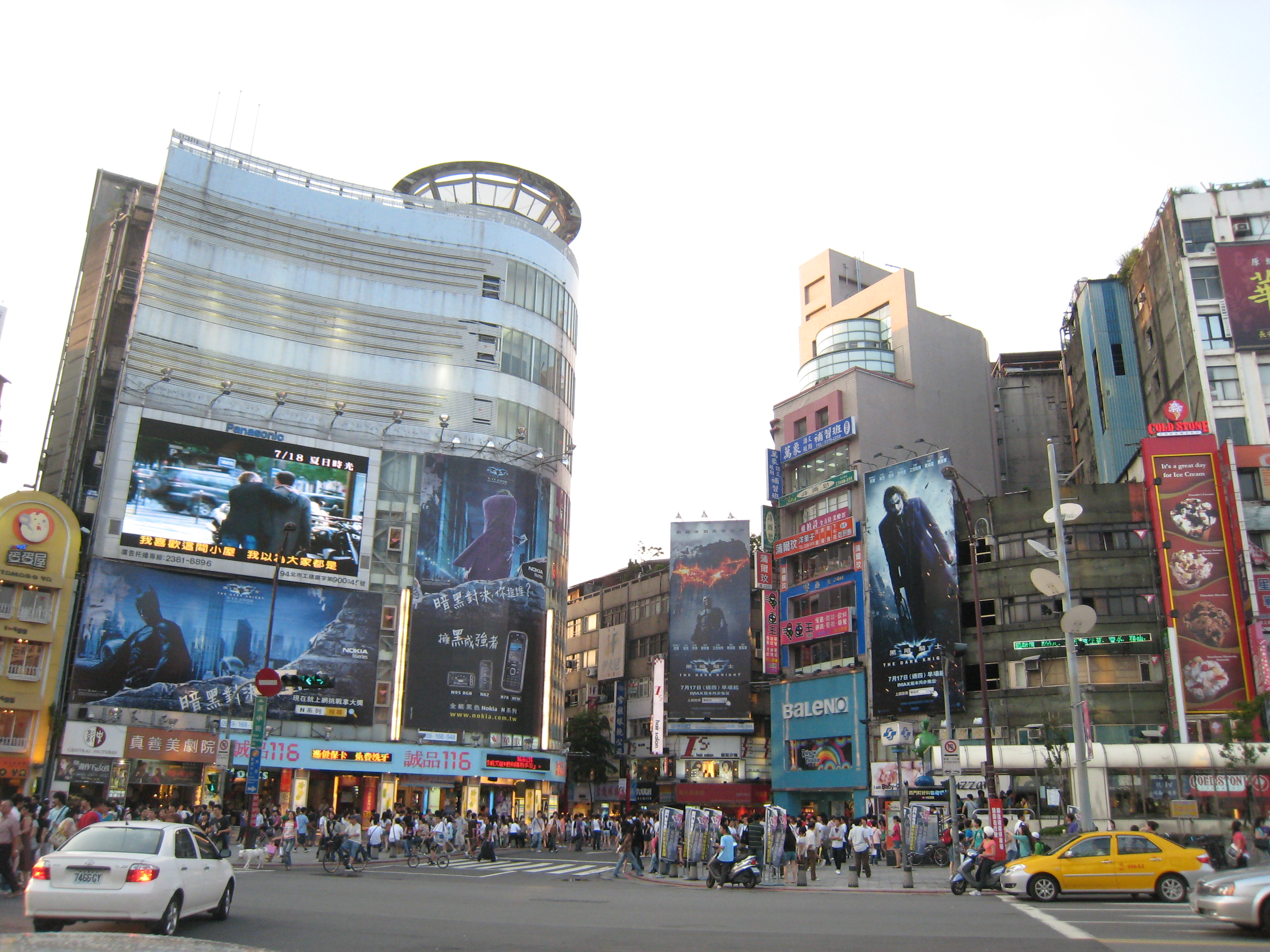 中影新世界大樓前。